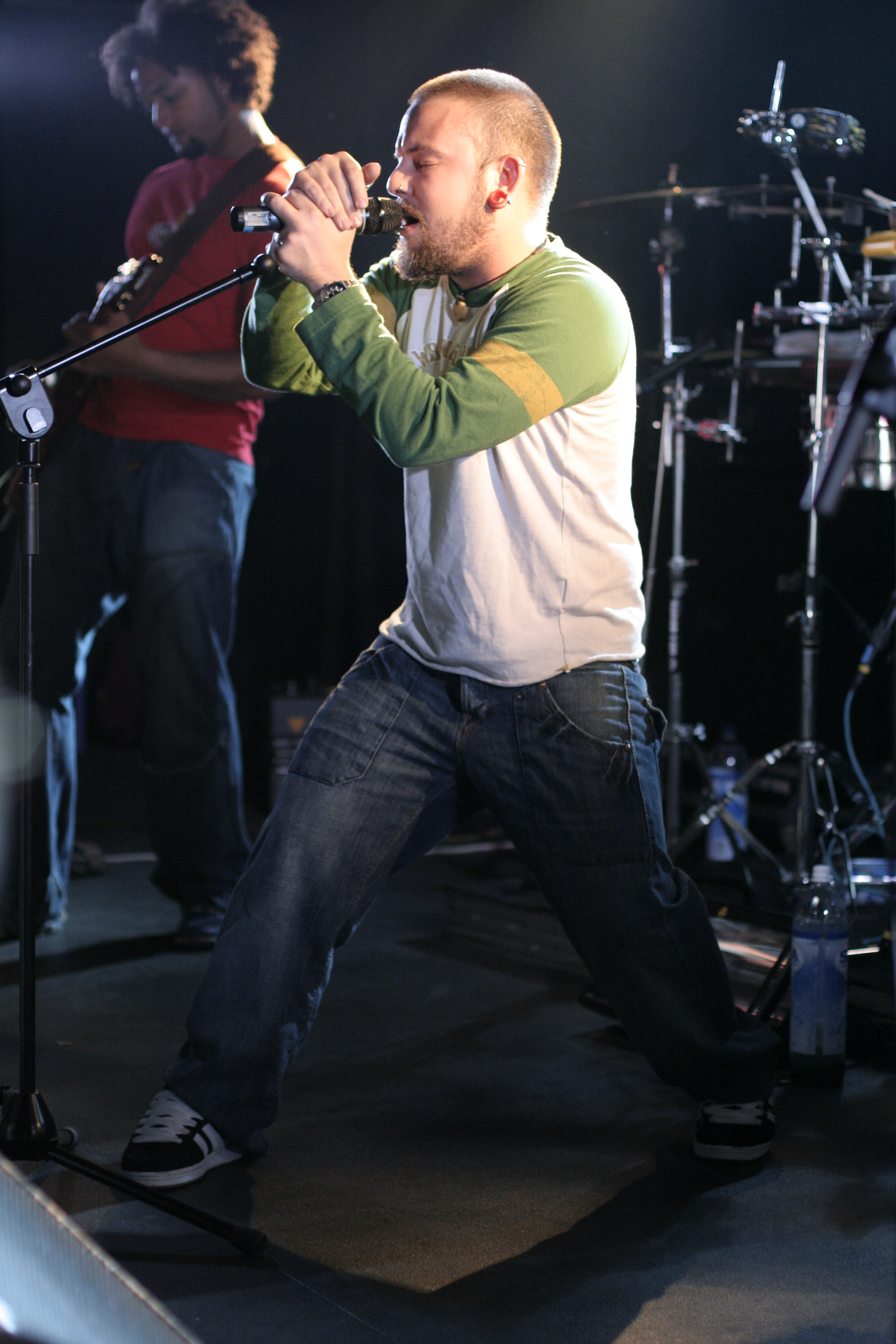 Intwine